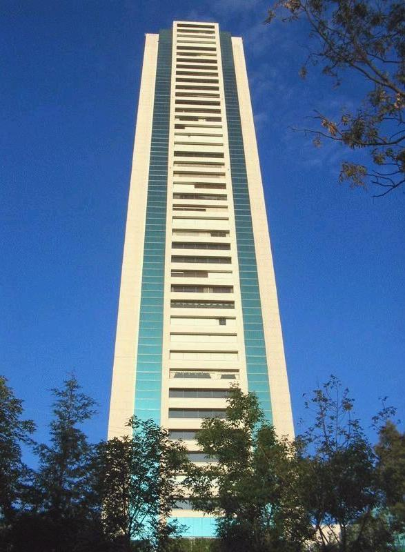 Torre Altus.